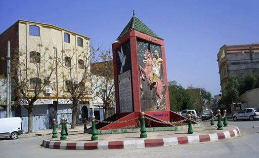 Maghnia-algeria